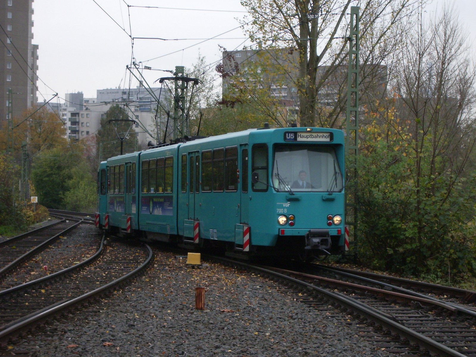 VGF Ptb 700 light rail car approaching Preungesheim (Frankfurt am Main), November 11 2005. Photo by myself, GNU-FDL. VGF-Stadtbahnwagen Ptb 700 bei der Einfahrt in Preungesheim (Frankfurt am Main), 11. November 2005. Selbst fotografiert, GNU-FDL.